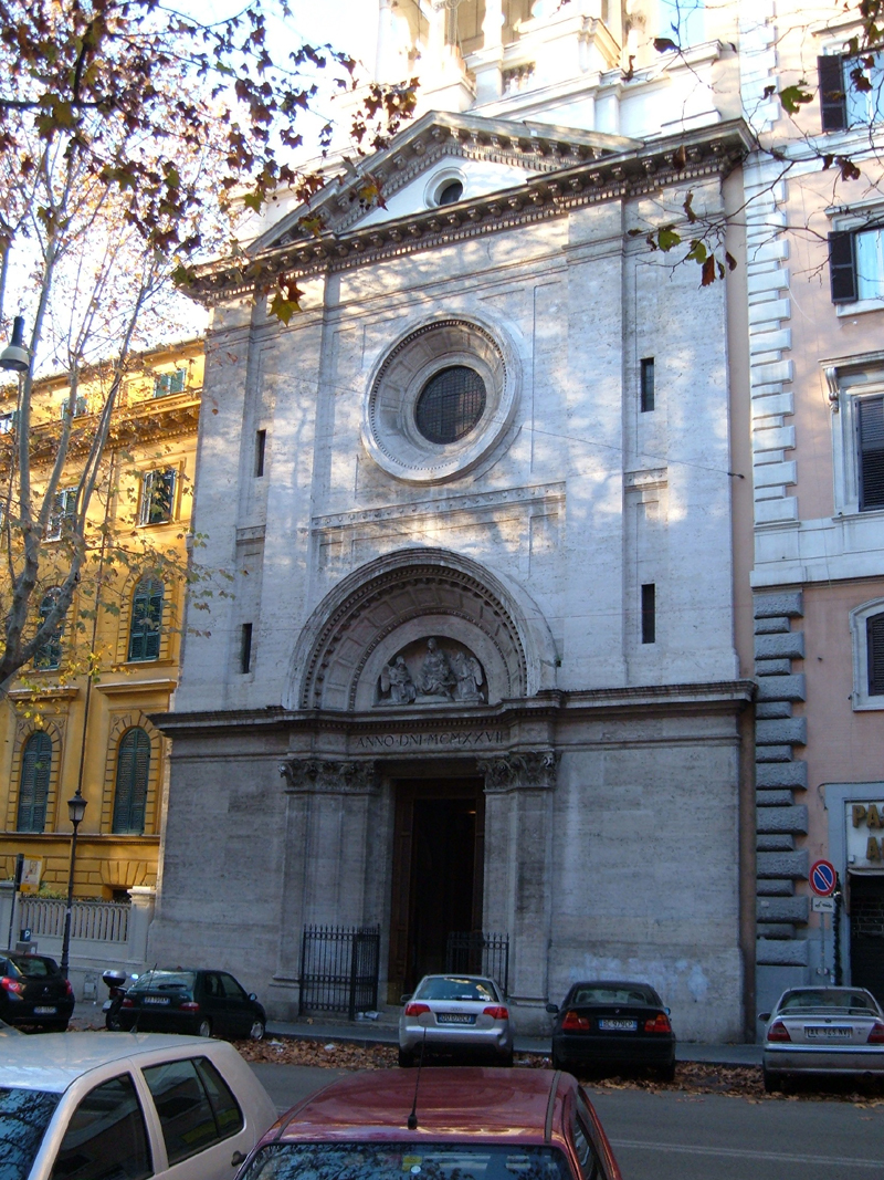 Chiesa di Sant'Anna al Laterano, a Roma, in via Merulana, nel rione Monti.